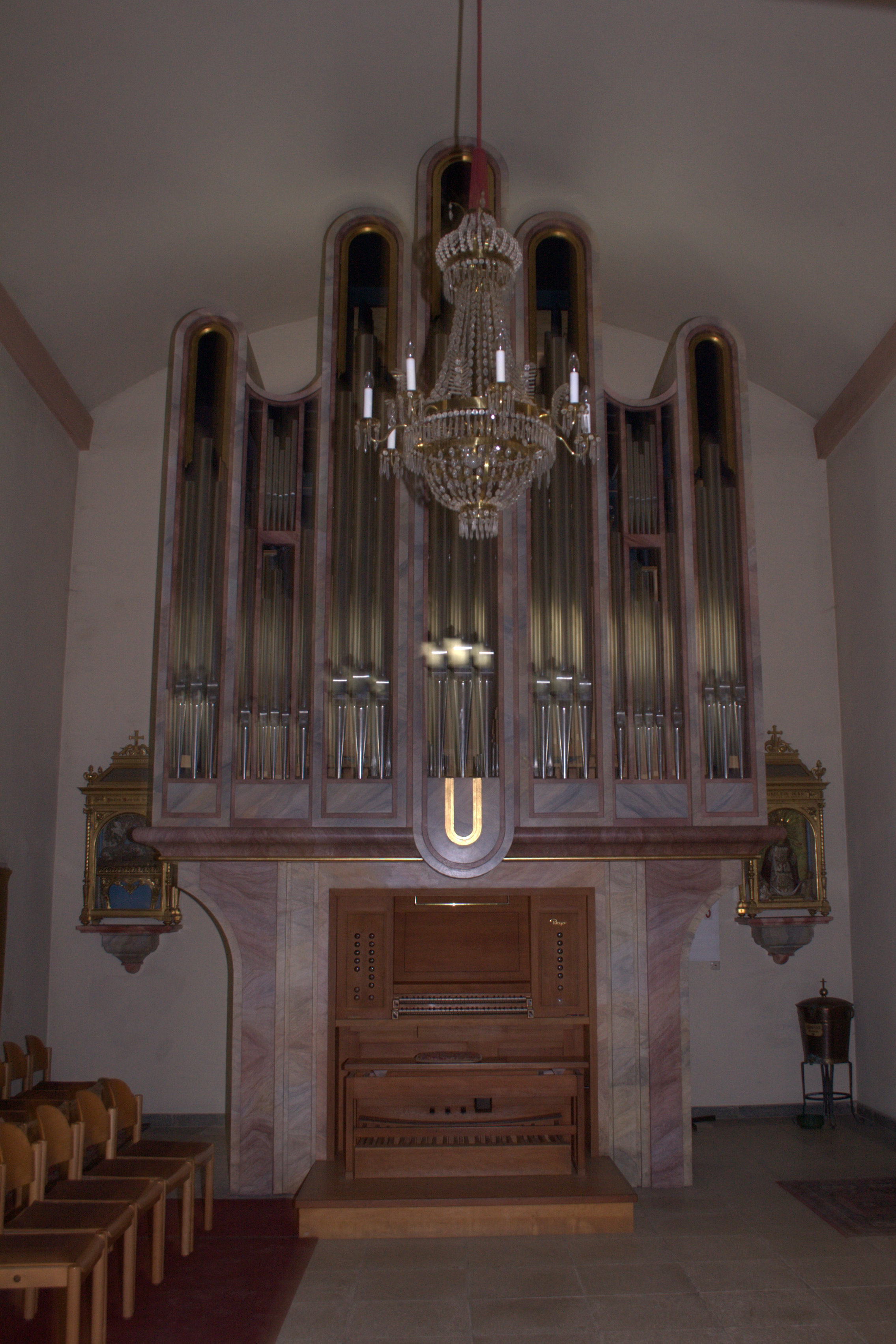 Maria Fieberbründl Kirche Orgel